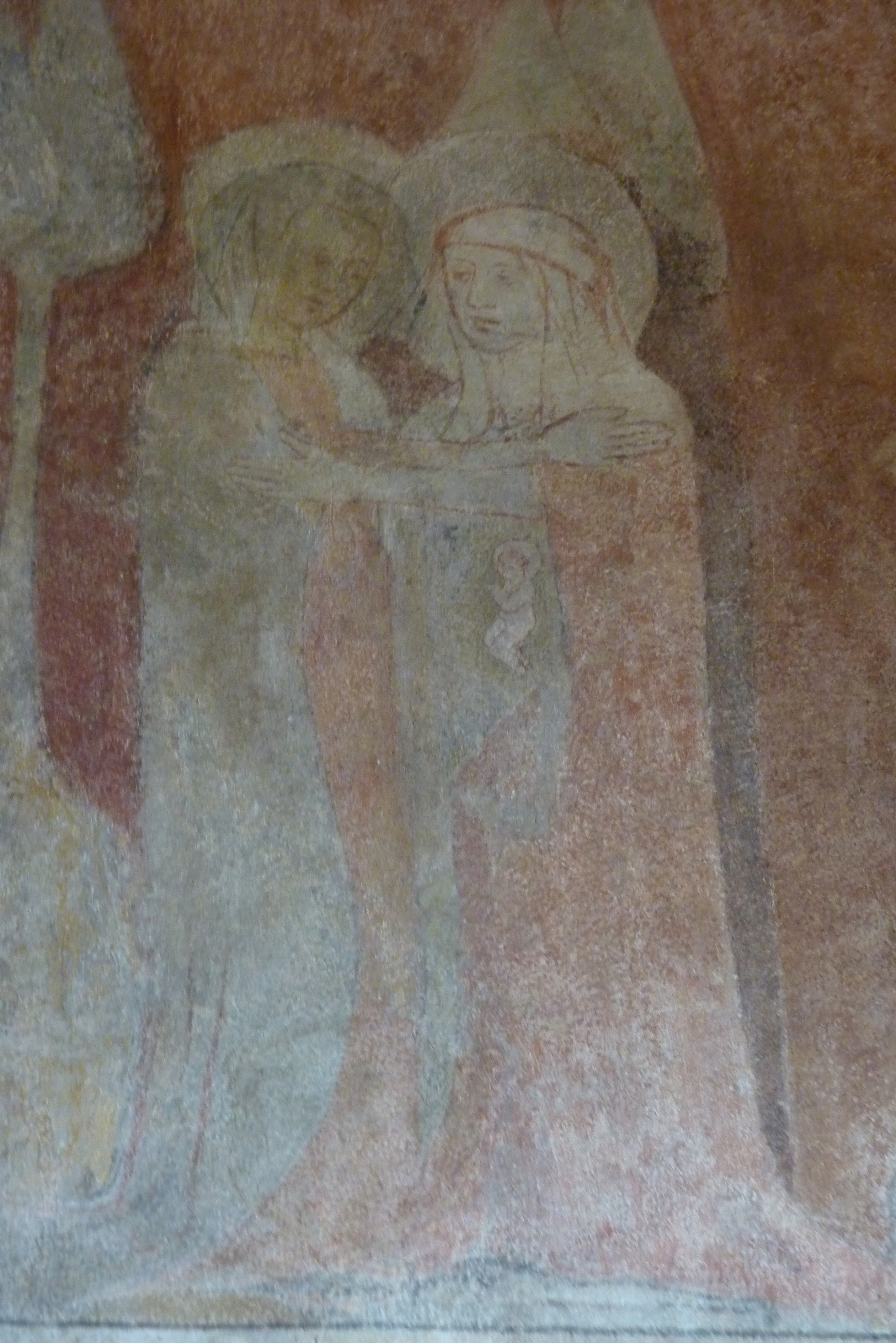 Evangelische Pfarrkirche St. Peter und Paul in Oberderdingen (im ehemaligen Dorf Unterderdingen) in Baden-Württemberg, Wandmalerei um 1380, Darstellung: Mariä Heimsuchung, mit der Darstellung des Jesuskindes im Mutterleib